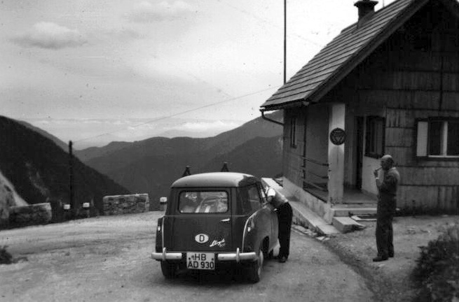 Loiblpass, Grenzkontrolle auf der jugoslawischen Seite. Juli 1959.